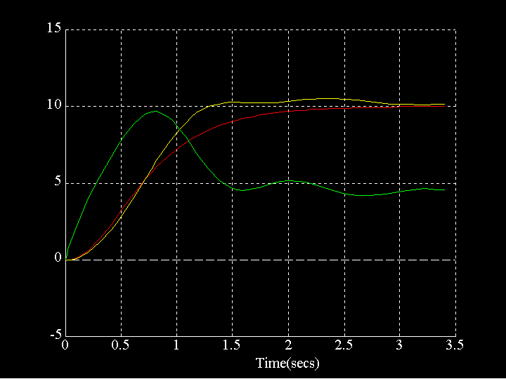 Wykres sterowania samochodem nadsterownym: linia czerwona - przebieg pożądany, linia żółta - przebieg rzeczywisty prędkości kątowej zakrętu, linia zielona - kąt skrętu kół sterowany przez kierowcę.